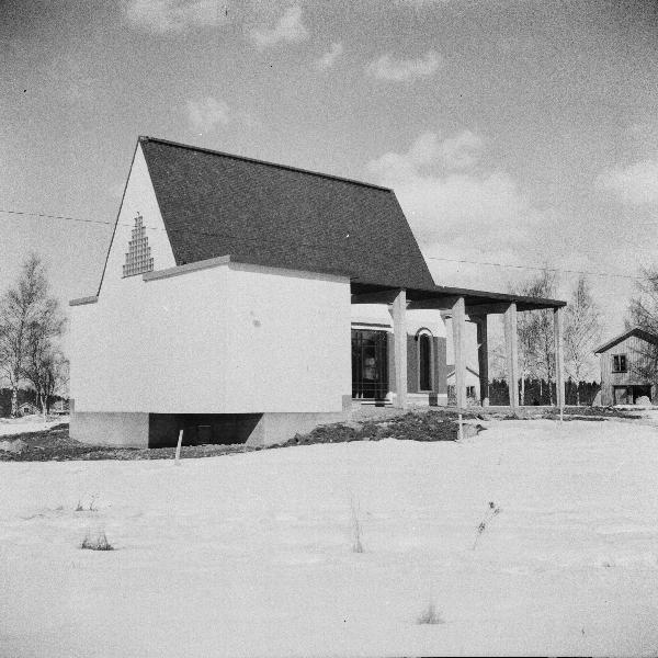 Kyrkan mot nordöst. Kategori: (01) ExteriörerKyrkan mot nordöst.